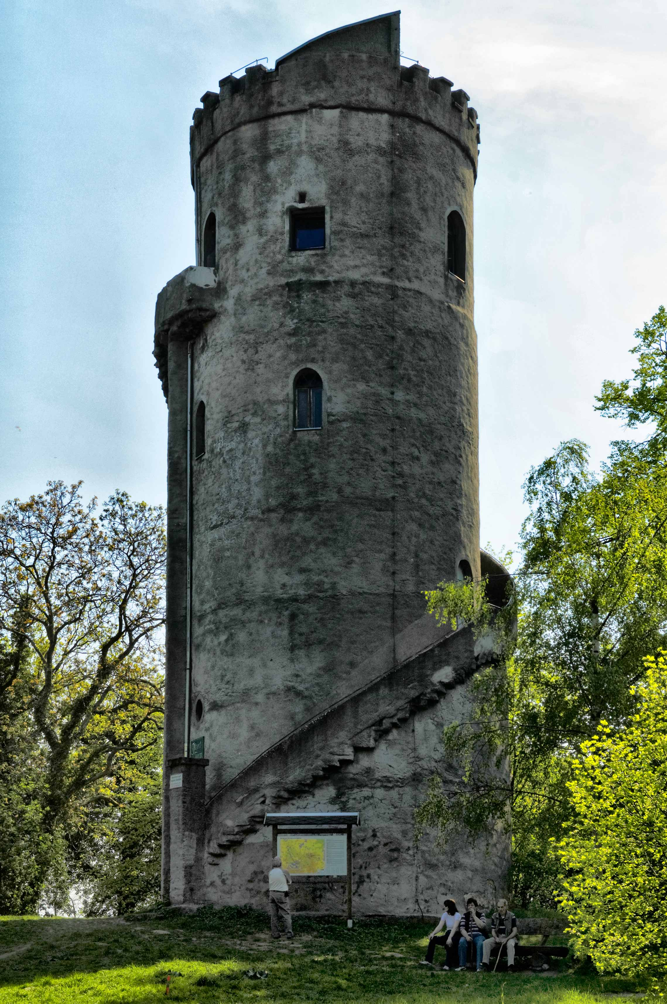 Der Alberttum auf dem Collm, Ortsteil von Wermsdorf in Sachsen